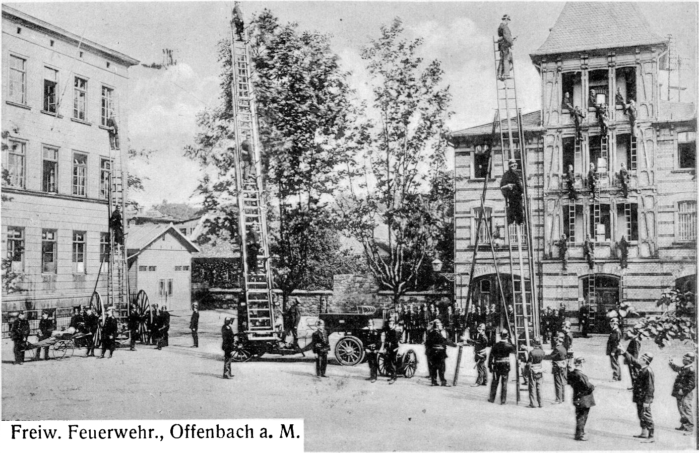 Freiwillige Feuerwehr Offenbach am Main bei einer Übung mit der neuen Drehleiter von der Feuerlöschgeräte & Maschinenfabrik A. G., vorm. Justus Christian Braun, Nürnberg und am 10.08.1903 in Dienst gestellt.